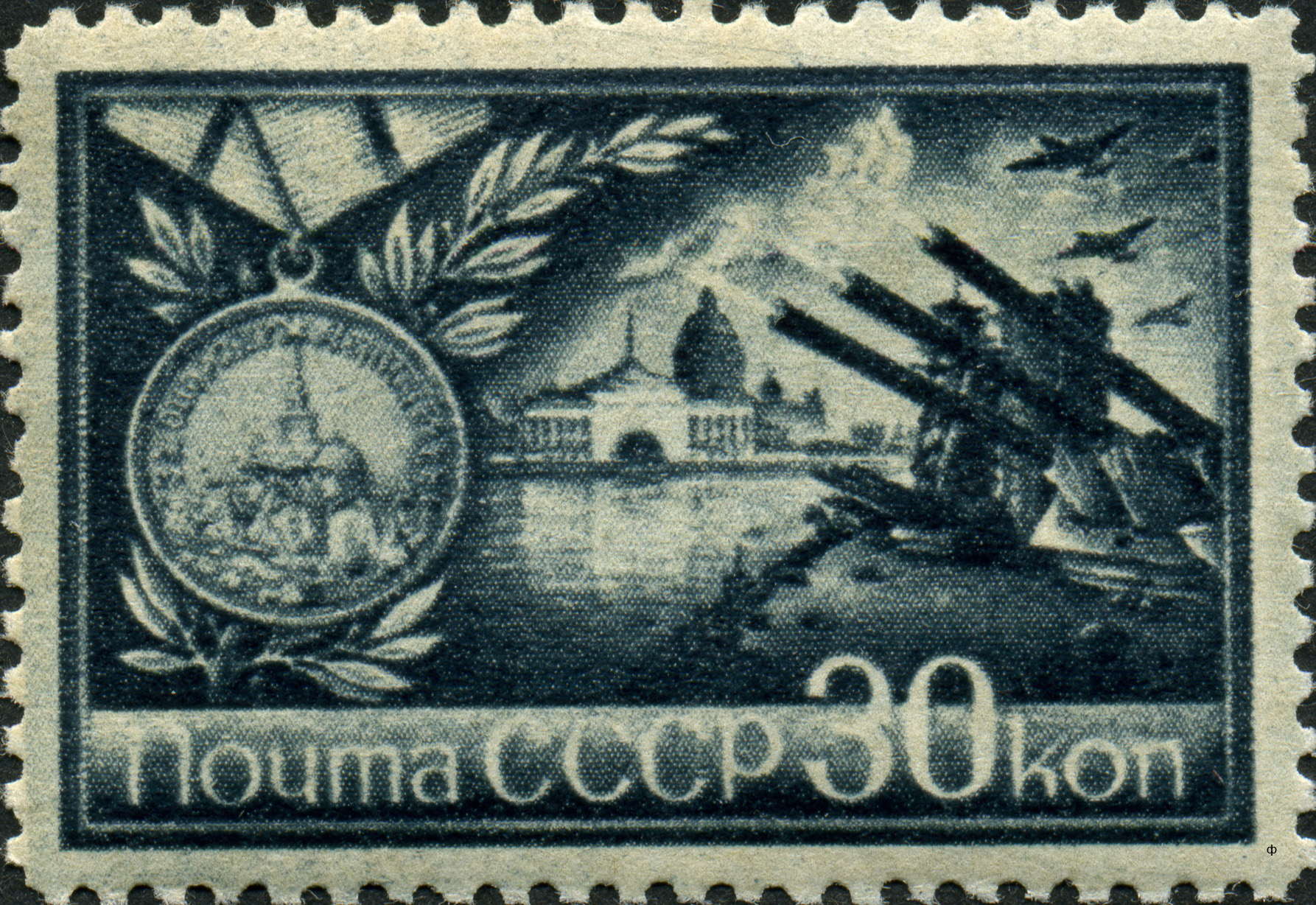 Марка СССР